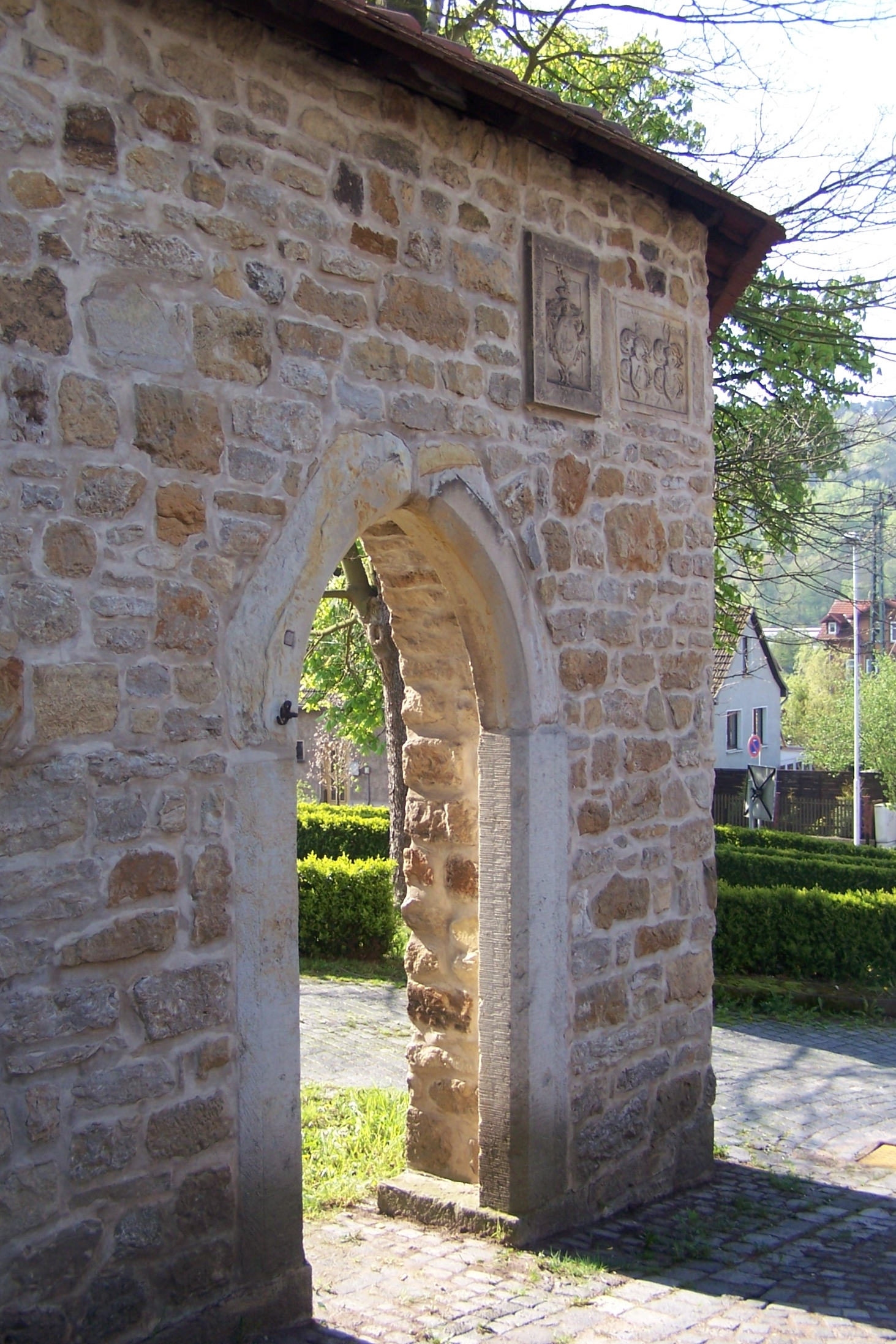 Ansicht des ergänzten Torbogens und Mauerpartie mit Wappensteinen.